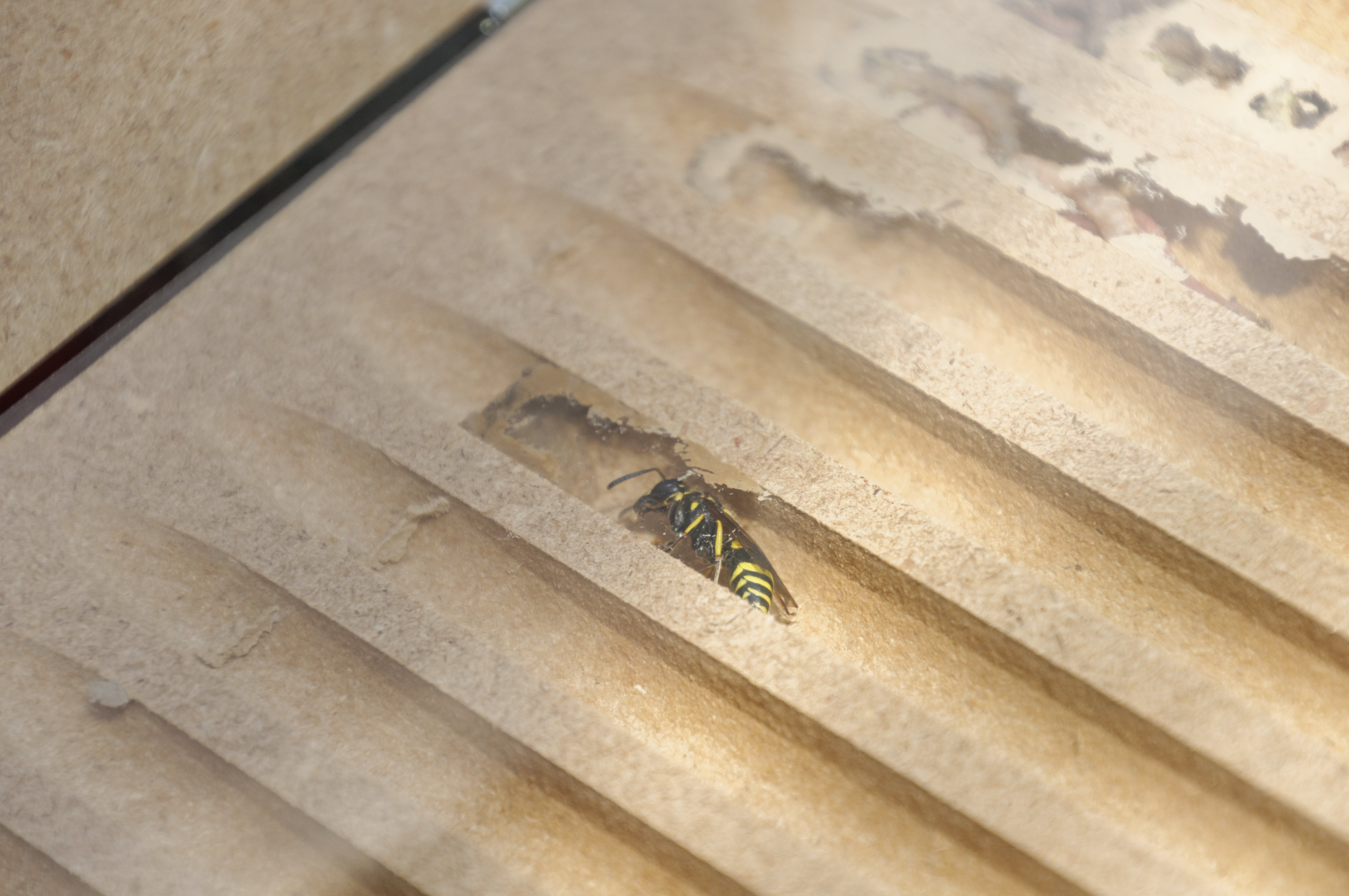 Lehmwespe bei der Arbeit